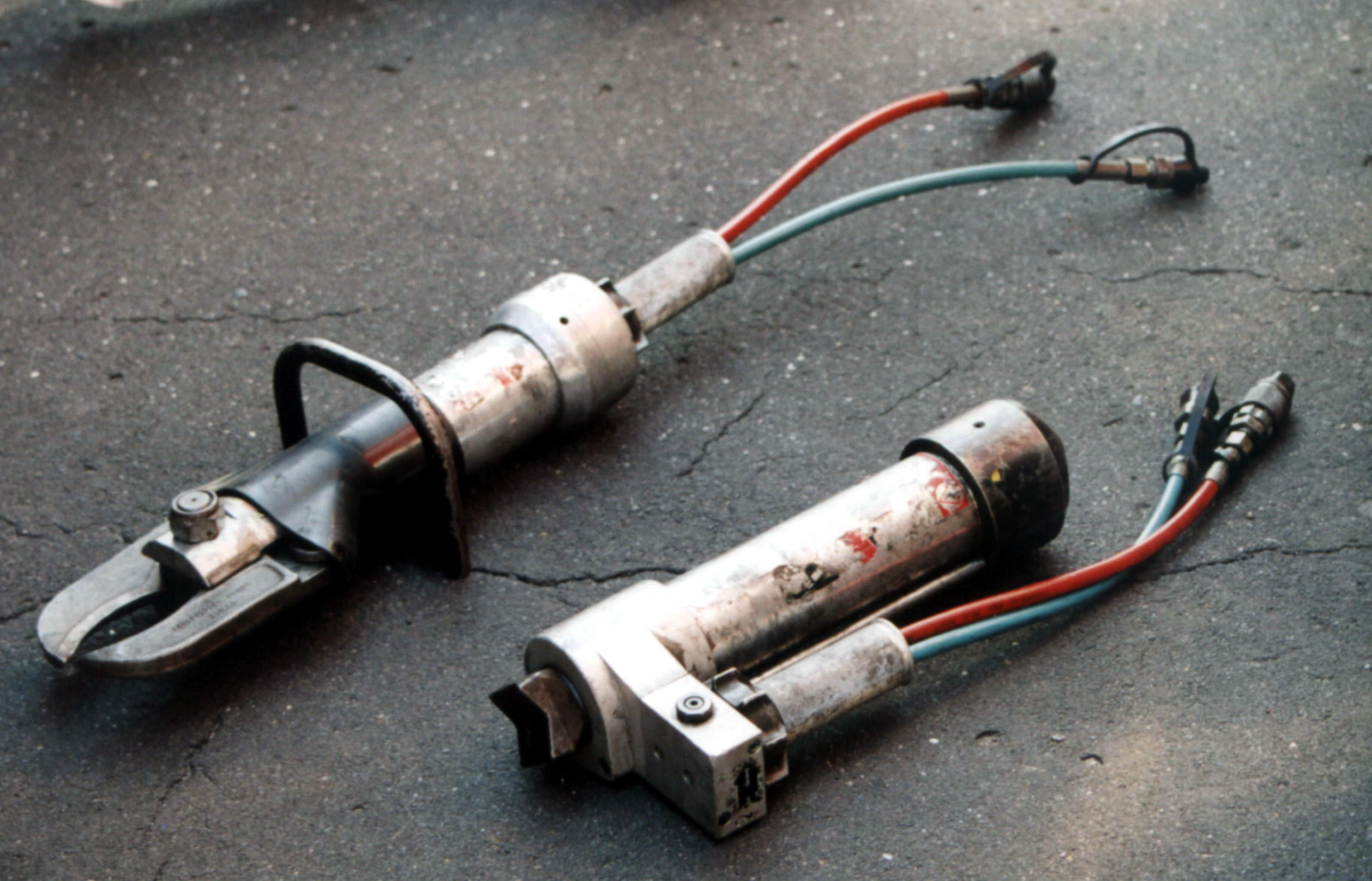 Nożyce hydrauliczne i rozpierak kolumnowy